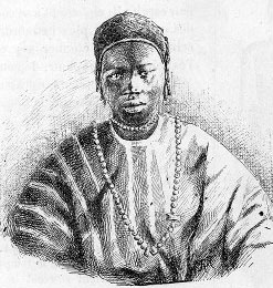 Ouolove du Cayor (Sénégal) (Illustration de Côte occidentale d'Afrique du Colonel Frey (Fig.24 p.47 [Cote : Réserve A 200 386)